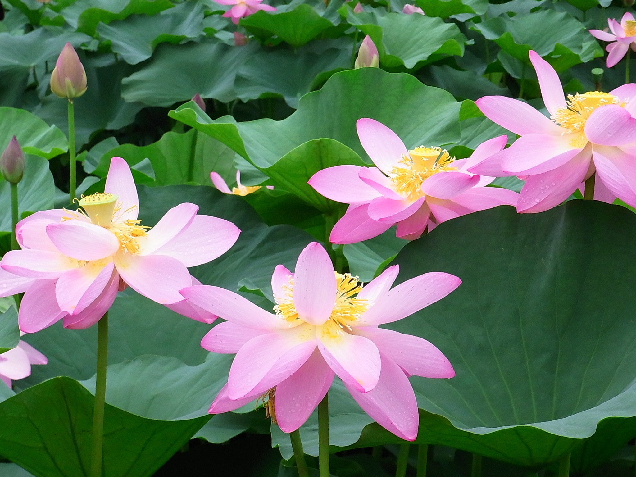 千葉市 千葉公園 Ricoh CX1